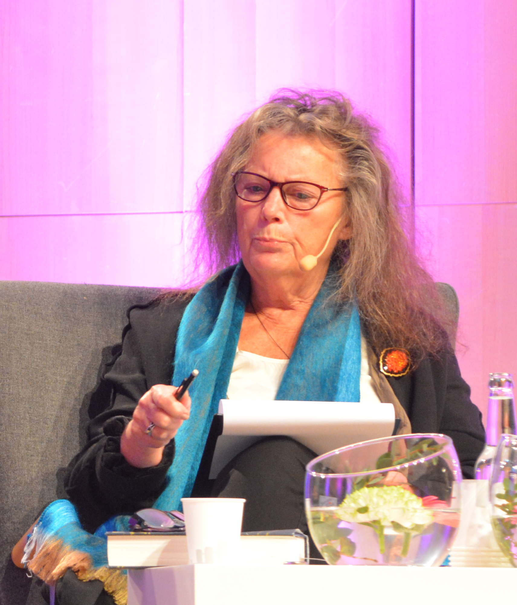 Kerstin Wixe on Göteborg Book Fair 2017.